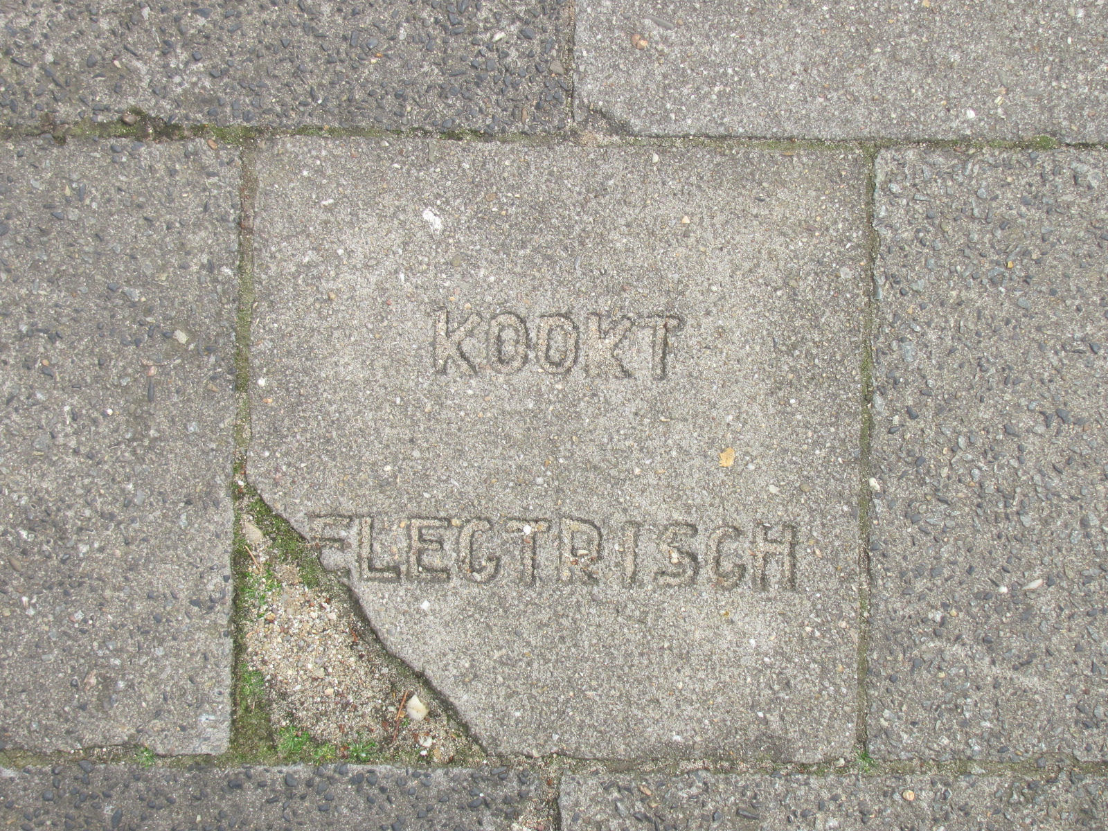 Openbare nutsbedrijven maakten (in de tijd dat elektriciteit nog met een c mocht worden geschreven en de verkoop van stroom in overheidshanden was) reclame via stoeptegels. Deze tegel ligt in de Gentiaanstraat in Arnhem (Nederland)